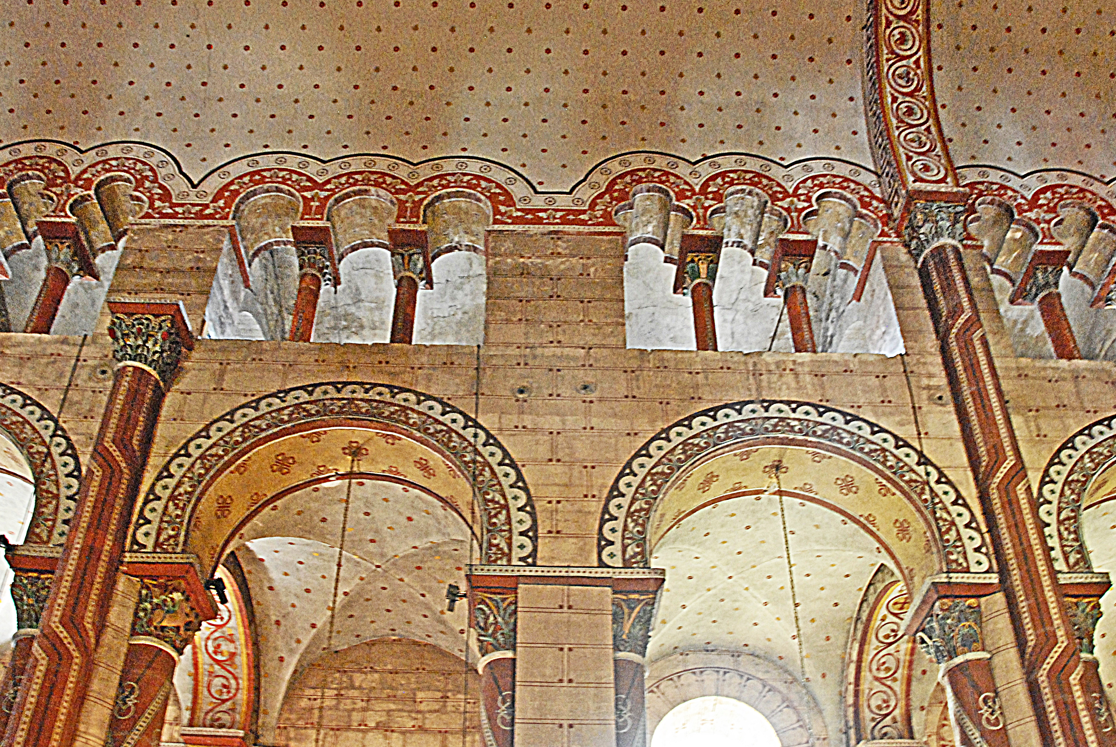 südl. Scheidewand, Jo. 4+5